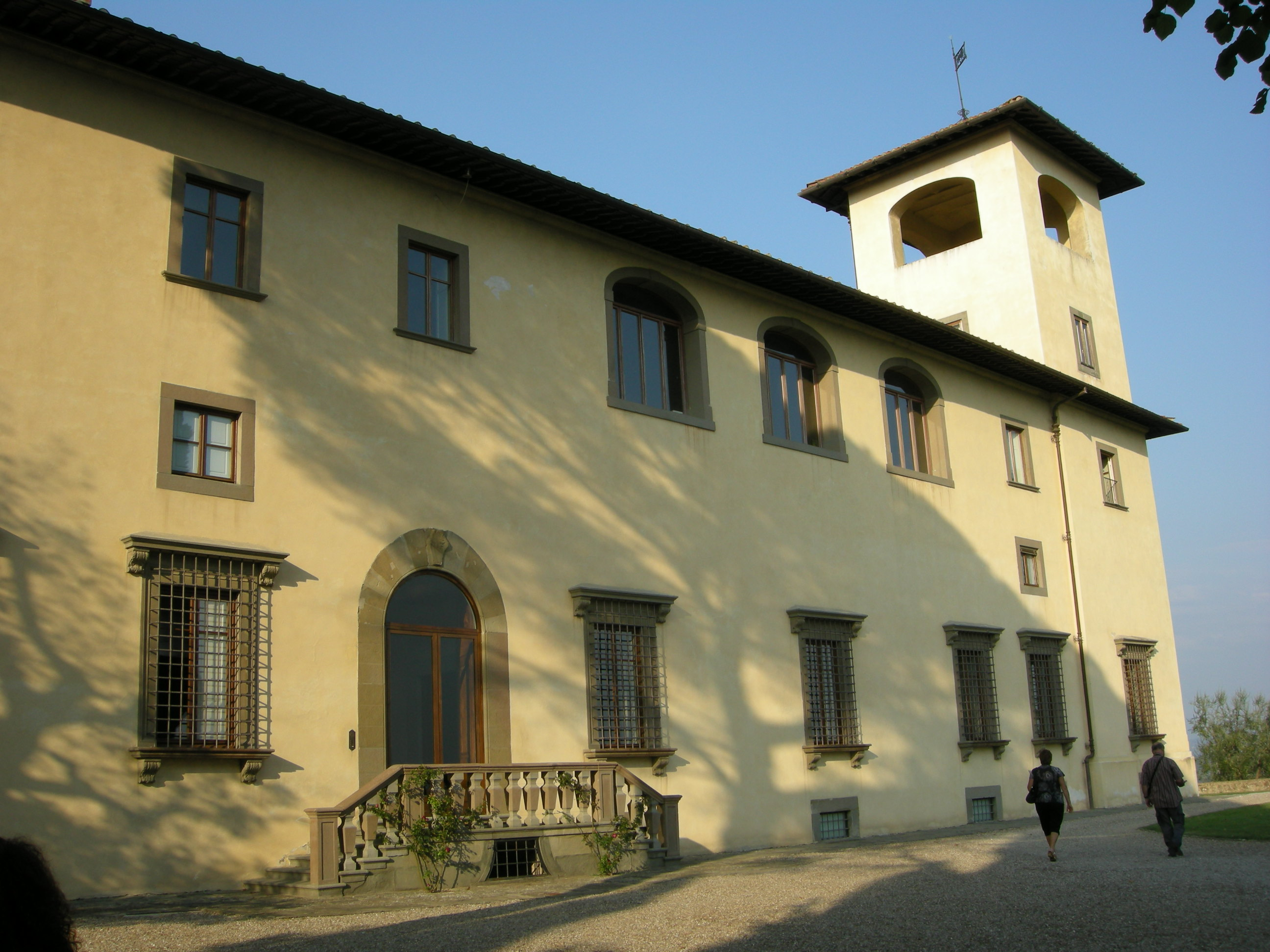 Villa la sfacciata